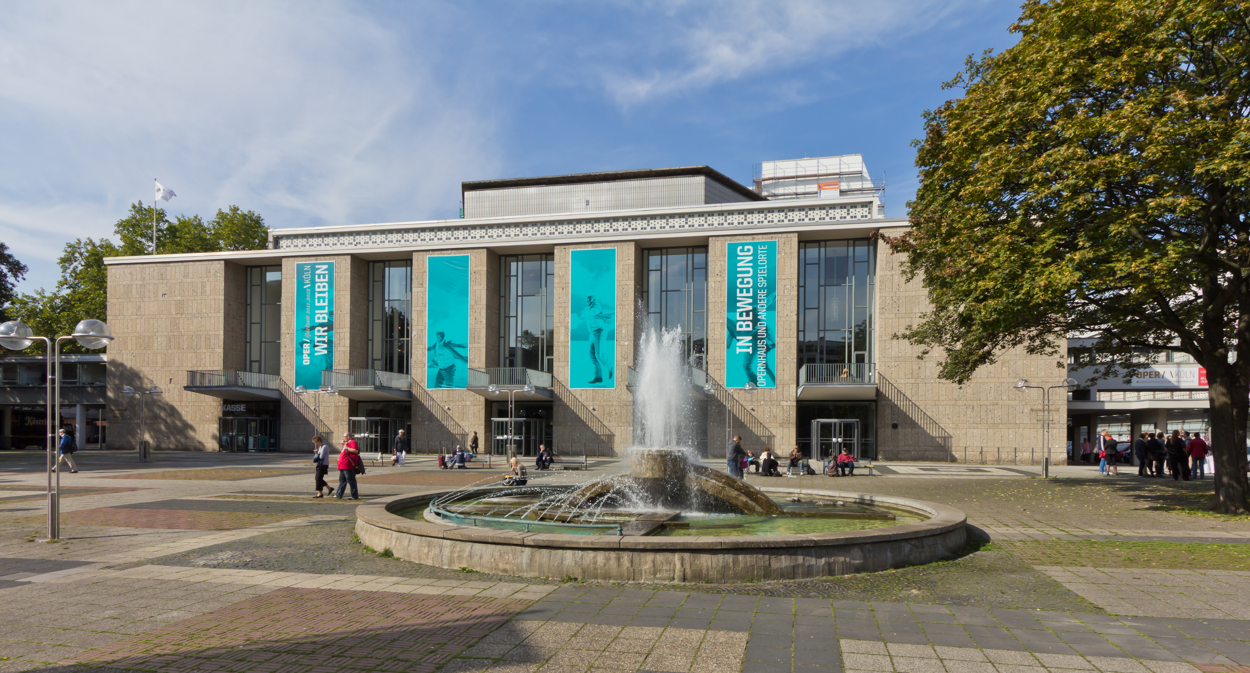 Denkmalgeschützte Platzanlage mit Brunnen: Opernbrunnen auf dem Offenbachplatz This is a photograph of an architectural monument.